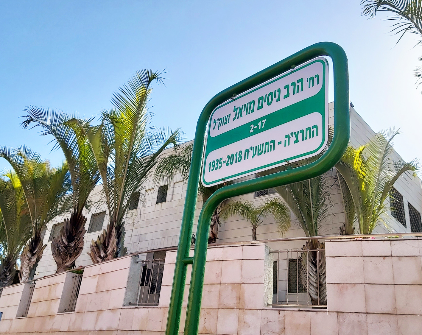 רחוב הרב נסים מויאל